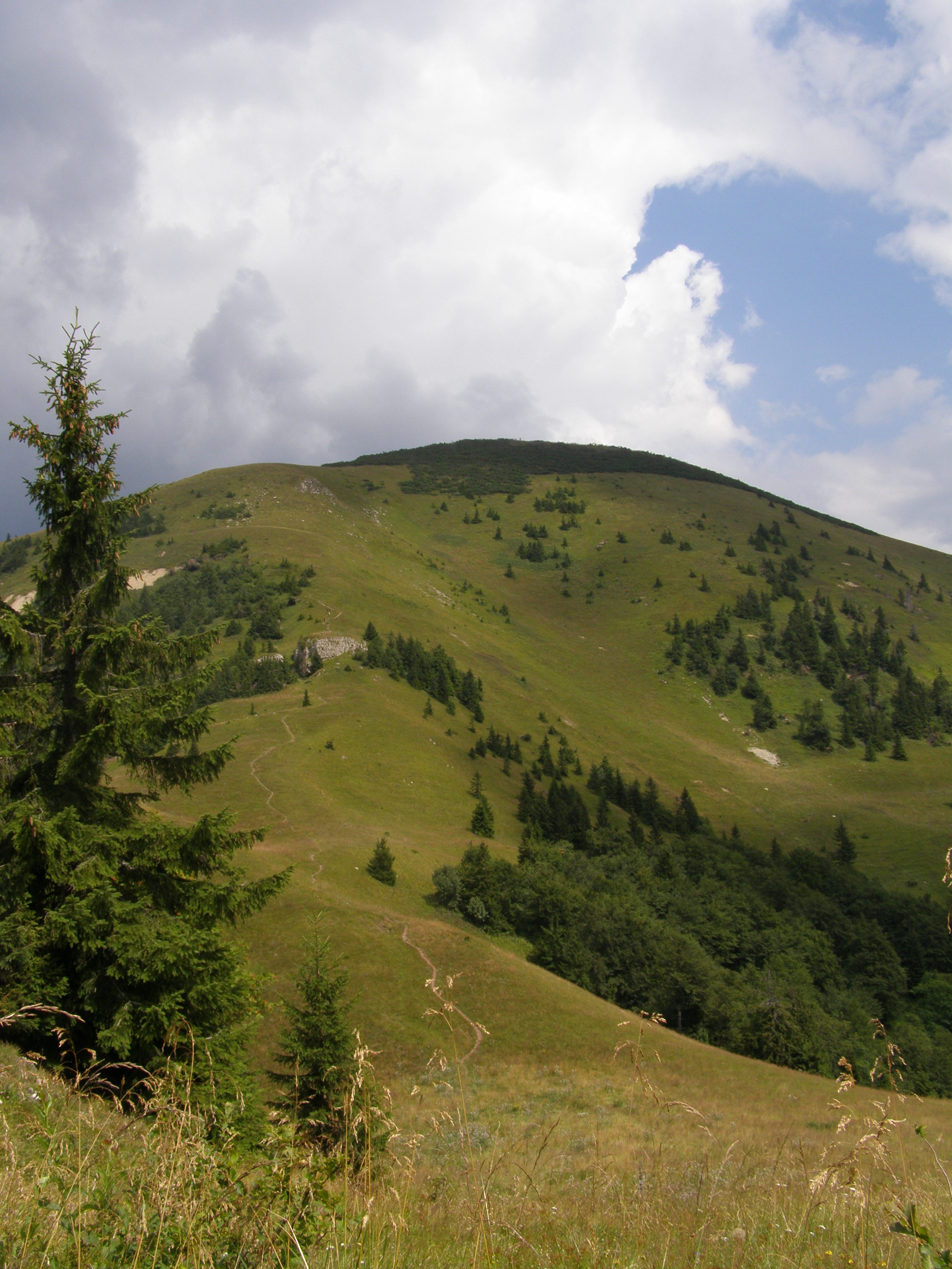 Velká Fatra, Rakytov (1567 m), pohled z jihu